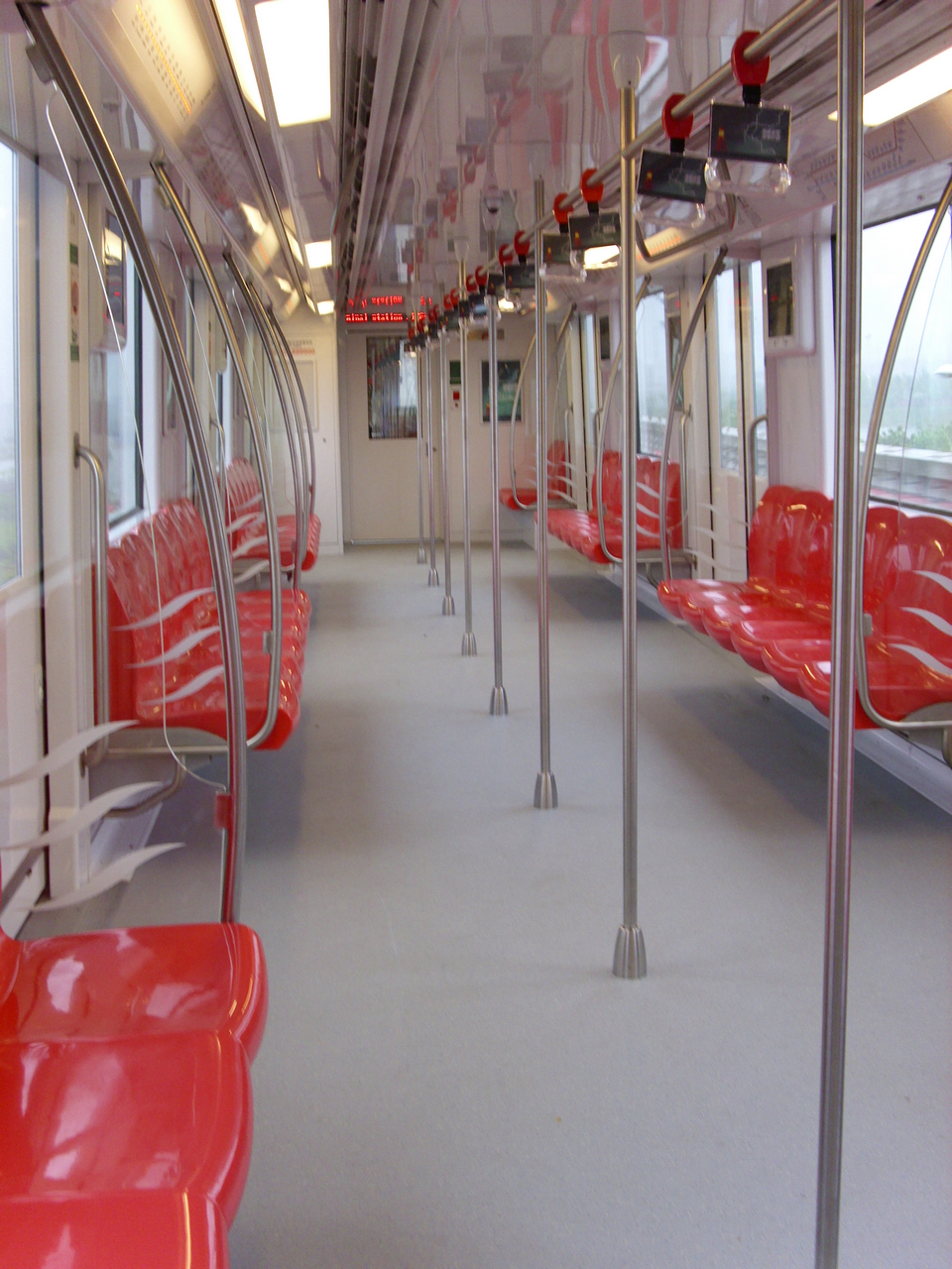 南京地铁2号线 列车内饰